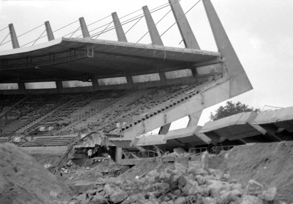 Rheinstadion Düsseldorf, halb abgerissen